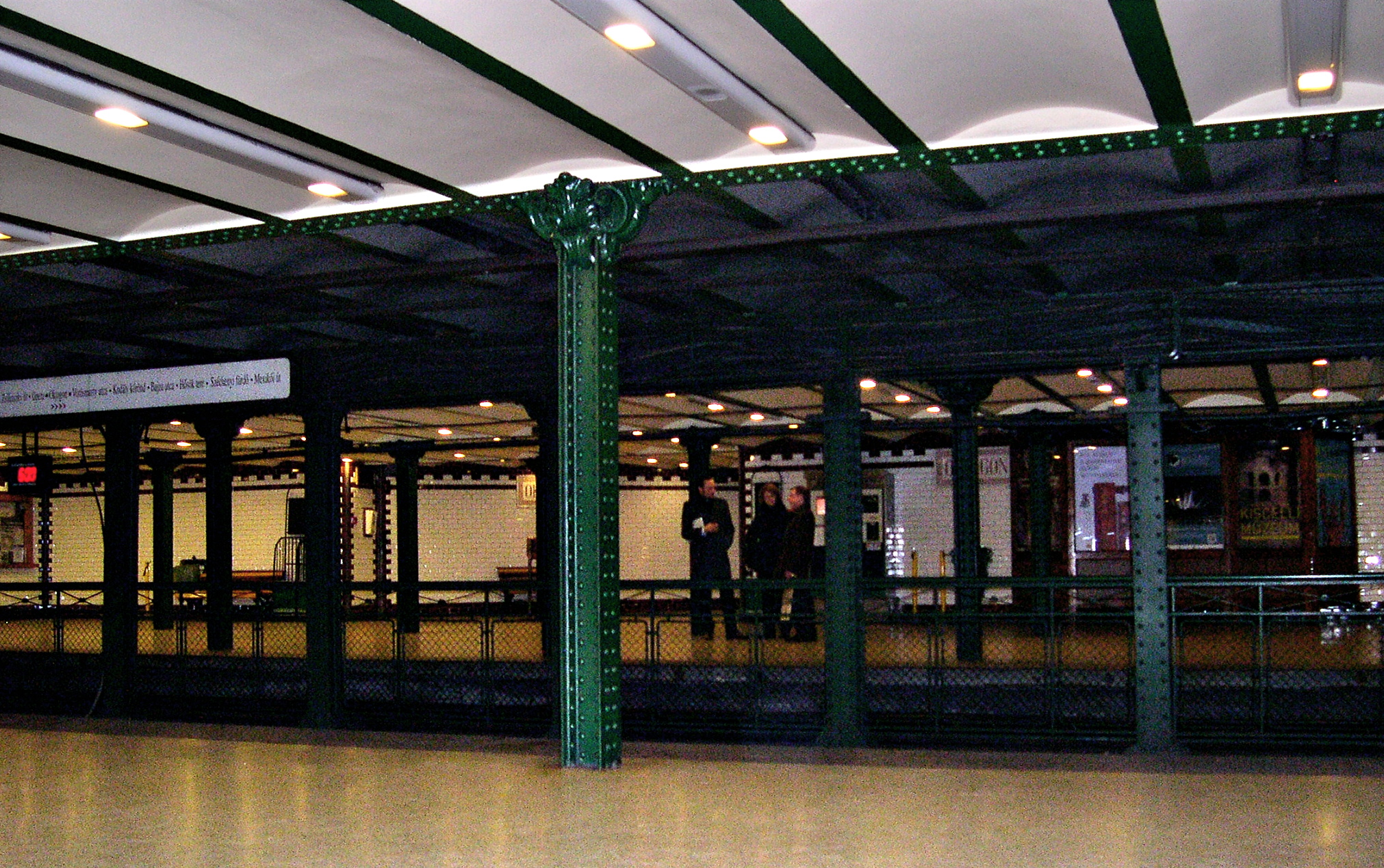 Oktogon állomás, Millenniumi Földalatti Vasút, Budapest